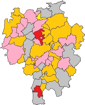 Mapa alcaldies Osona d'acord amb les eleccions de maig de 2019